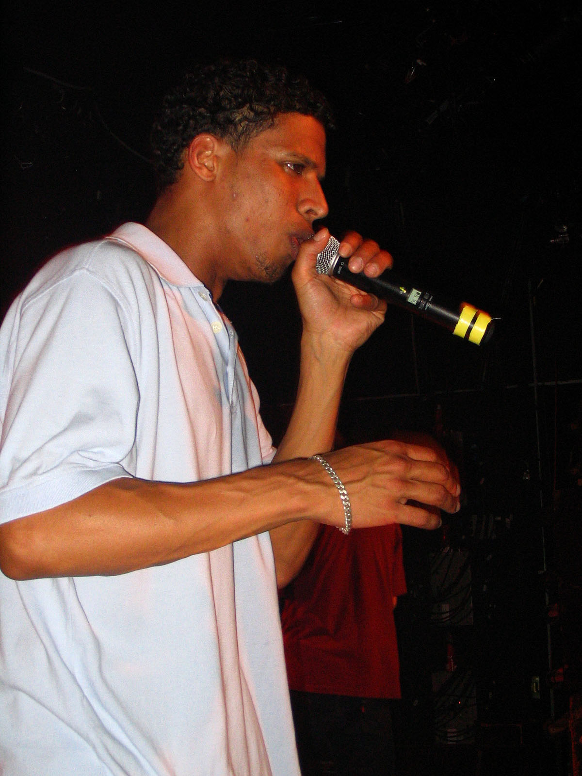 Opgezwolle @ Vera, Groningen